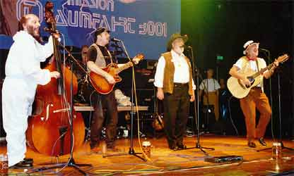 Schwfuss 00